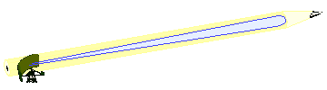 Symbolische Darstellung eines Pecil Beams